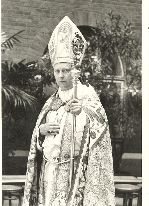 Maksimiljan Držečnik